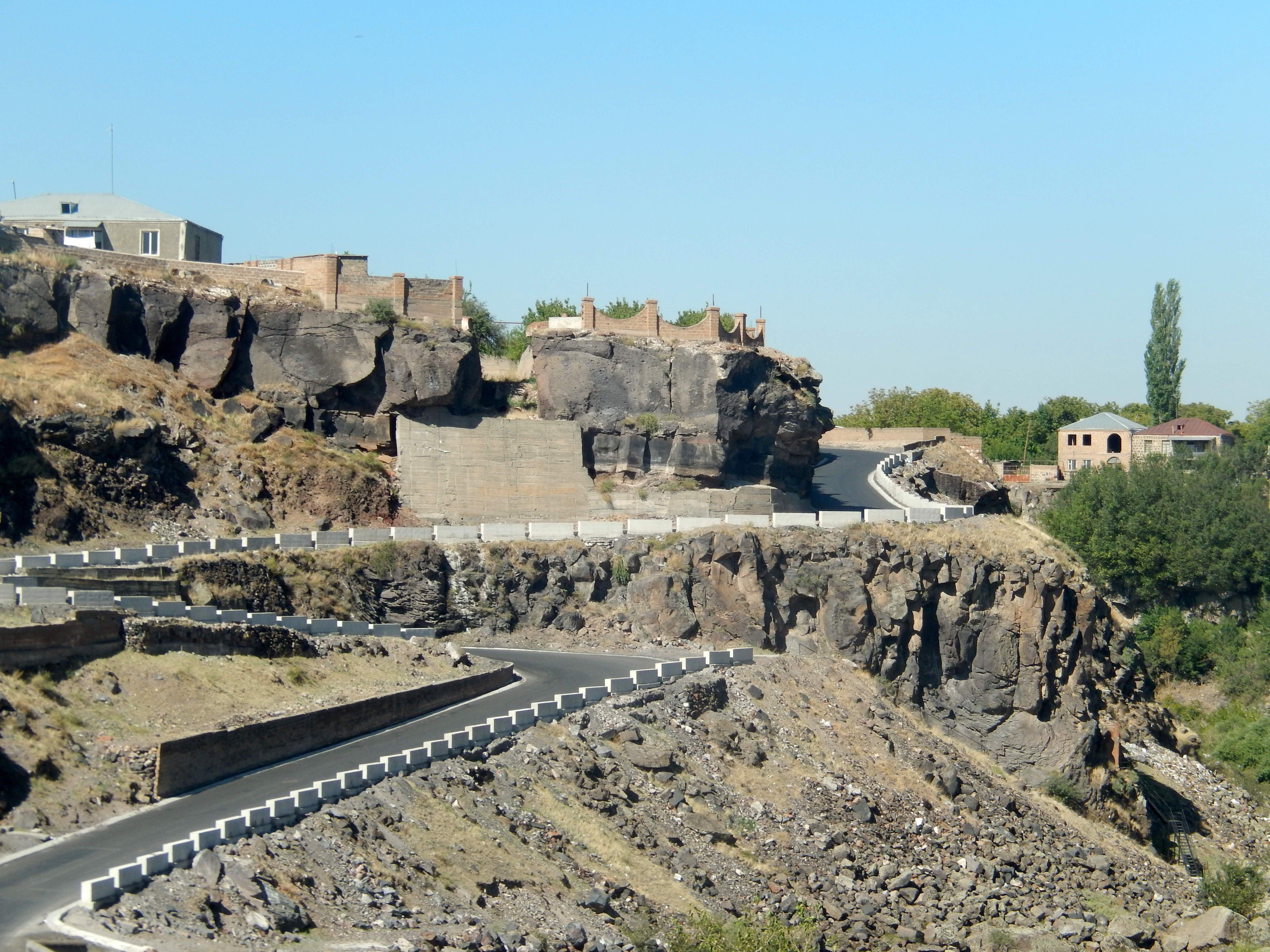 Օշական, կամուրջ 113/24